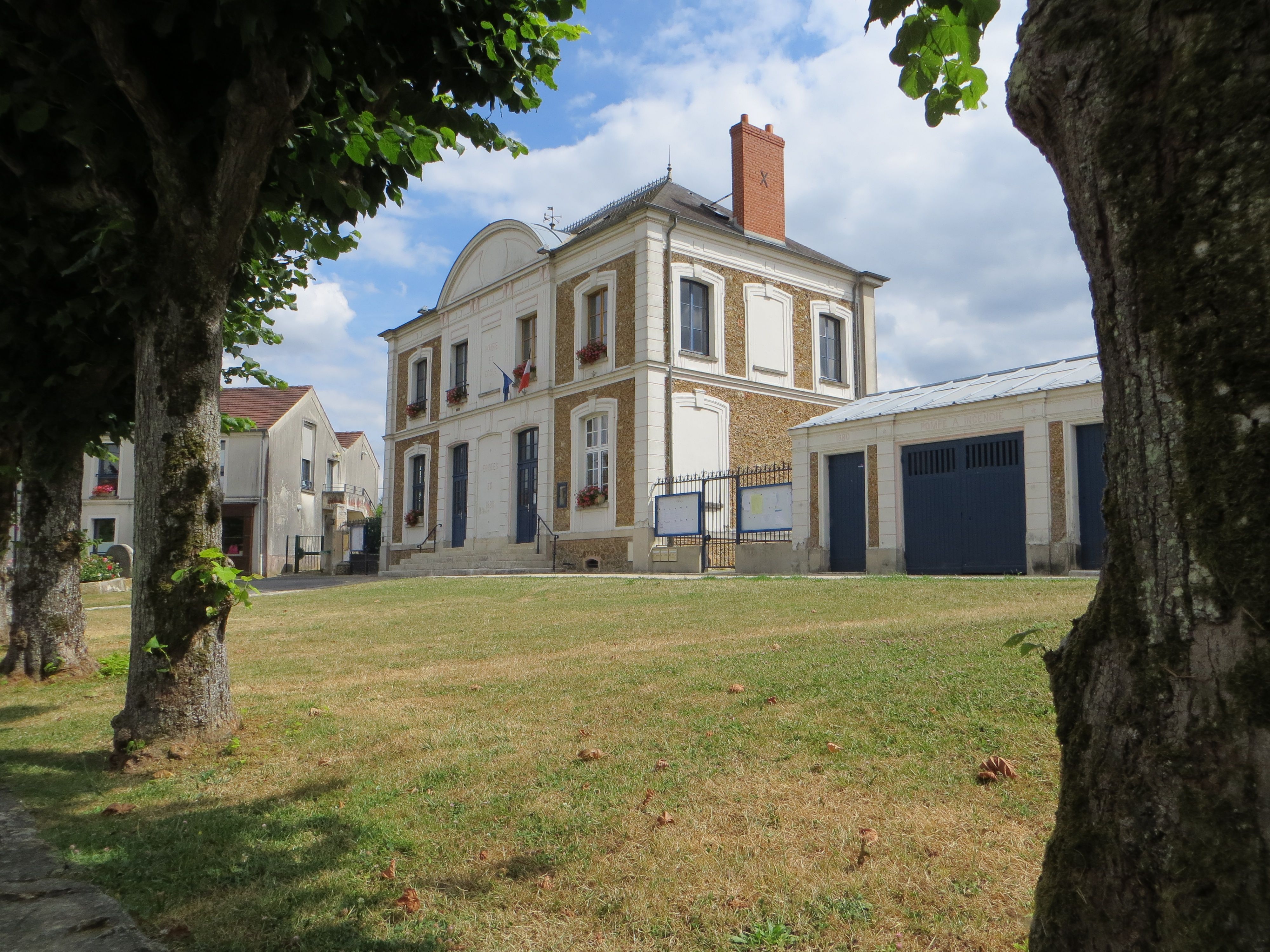 Mairie-école de Coutevroult. Date de construction 1880 selon la façade